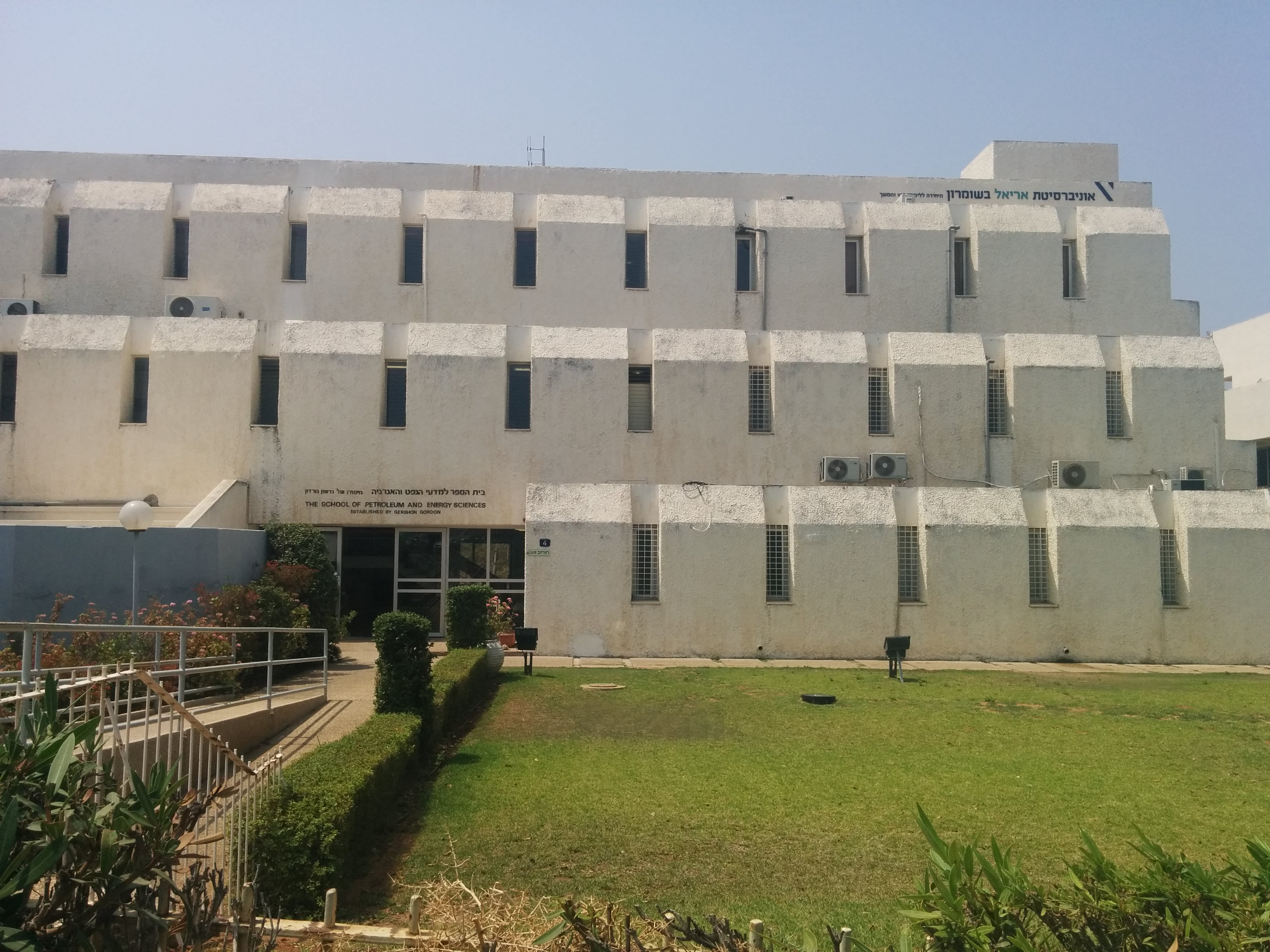 היחידה ללימודי חוץ של אוניברסיטת אריאל בשומרון